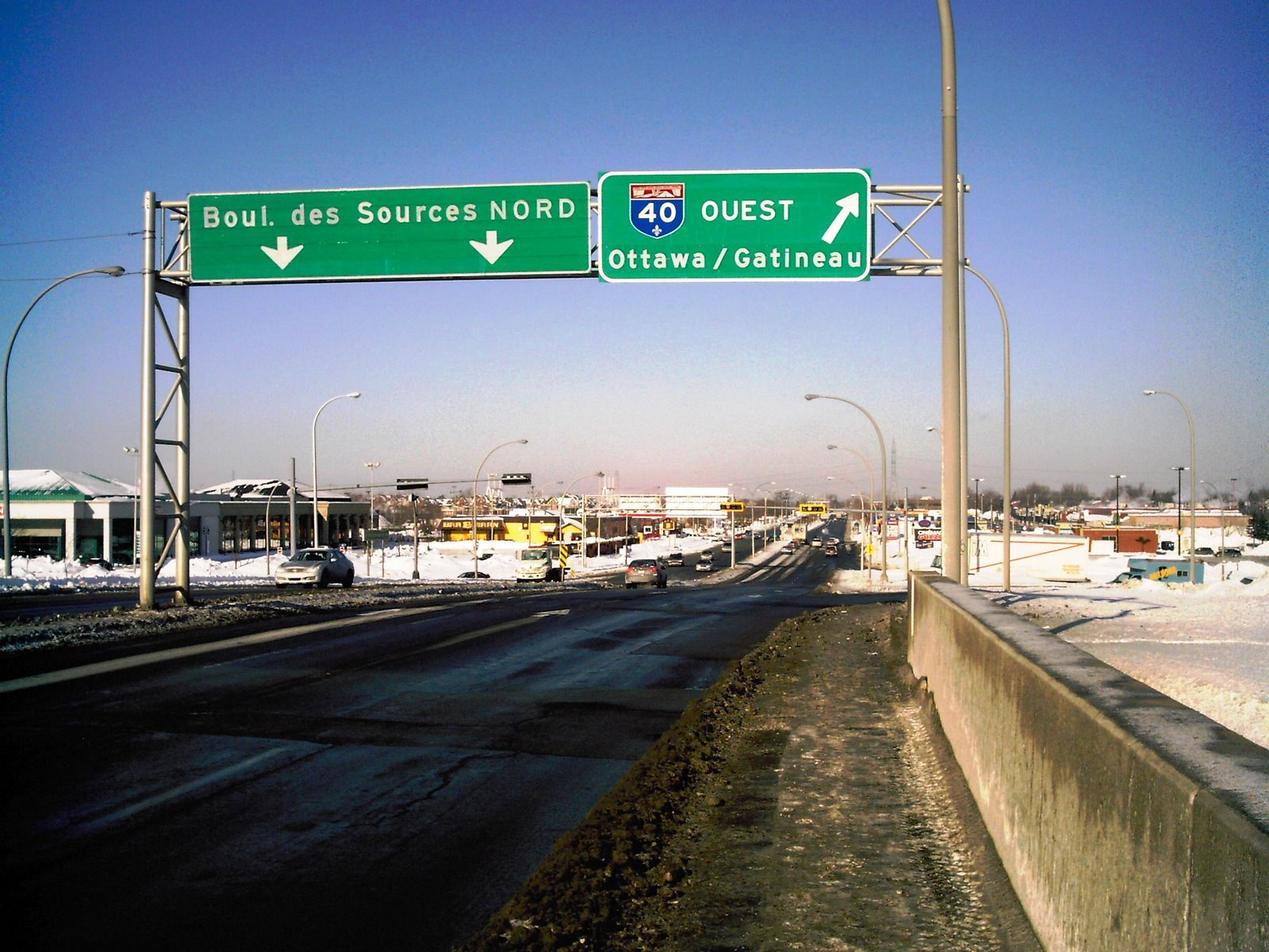 Le boulevard des Sources, au-dessus de l'autoroute 40, dans l'ouest de l'île de Montréal.